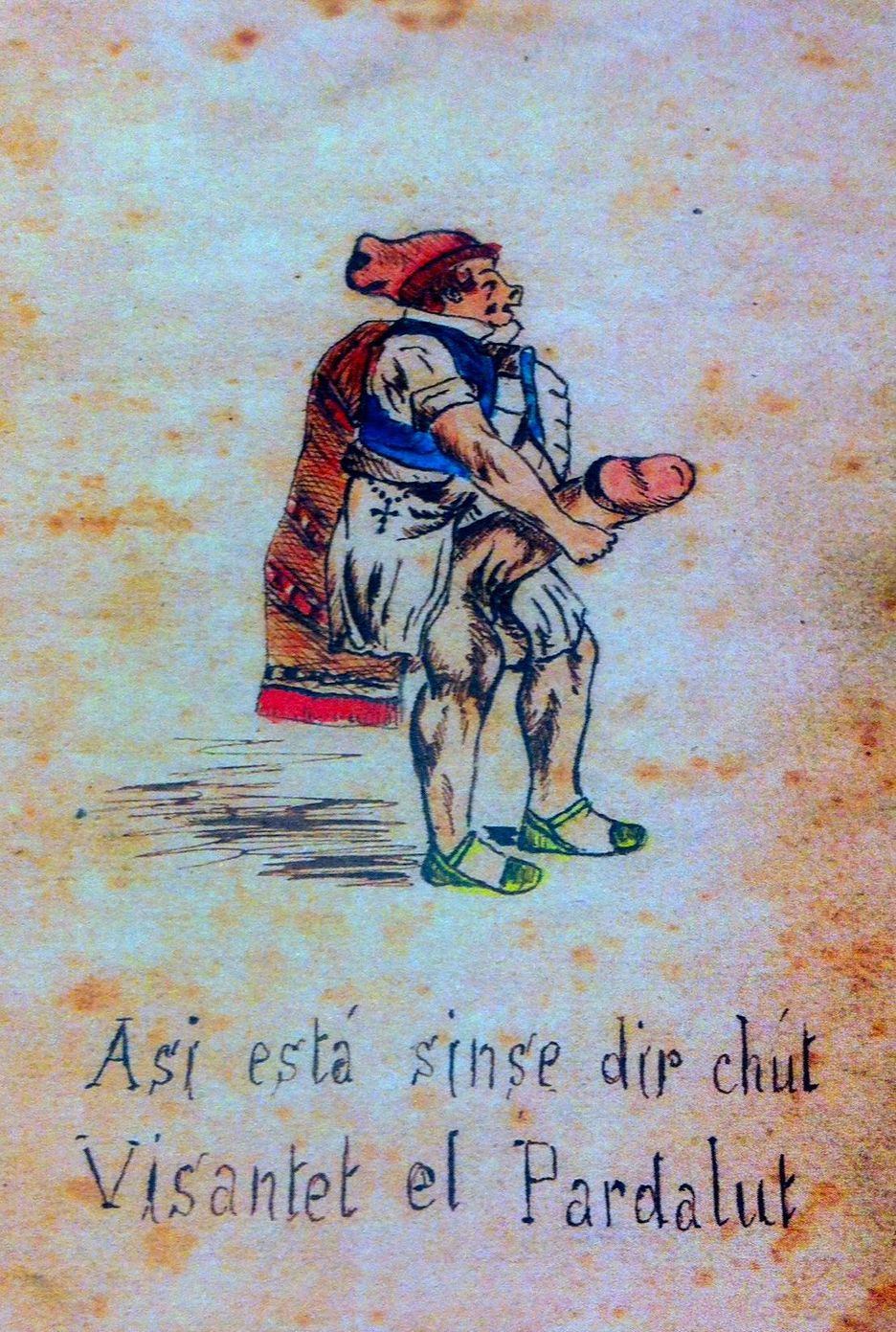 "Visantet el pardalut", il·lustració de l'obra homònima (i anònima) publicada en Almussafes a finals del segle XIX